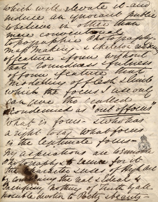 Letter to John Herschel, p. 4